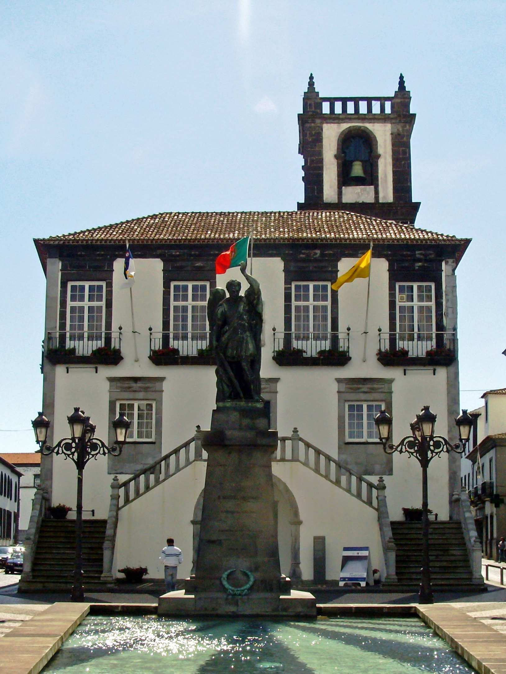 Paços do Concelho (Câmara Municipal), cidade e concelho de Ponta Delgada, ilha de São Miguel, Açores.